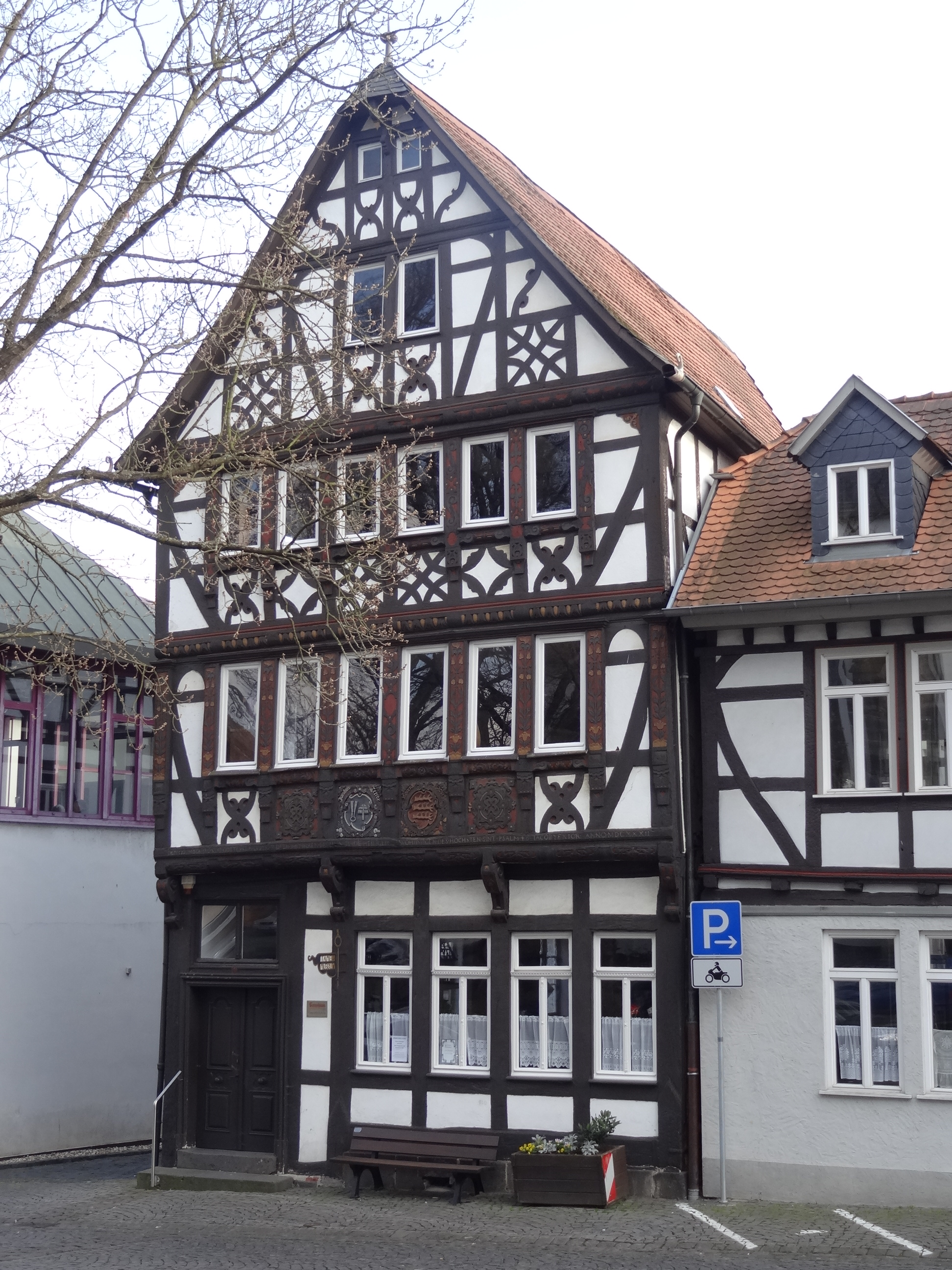 Kirchplatz 4 (Lich)